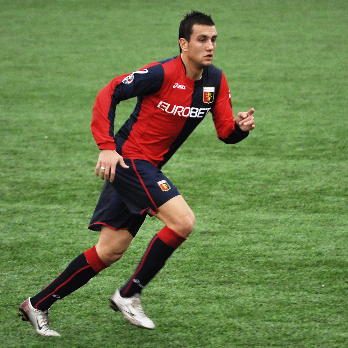 Boško Janković